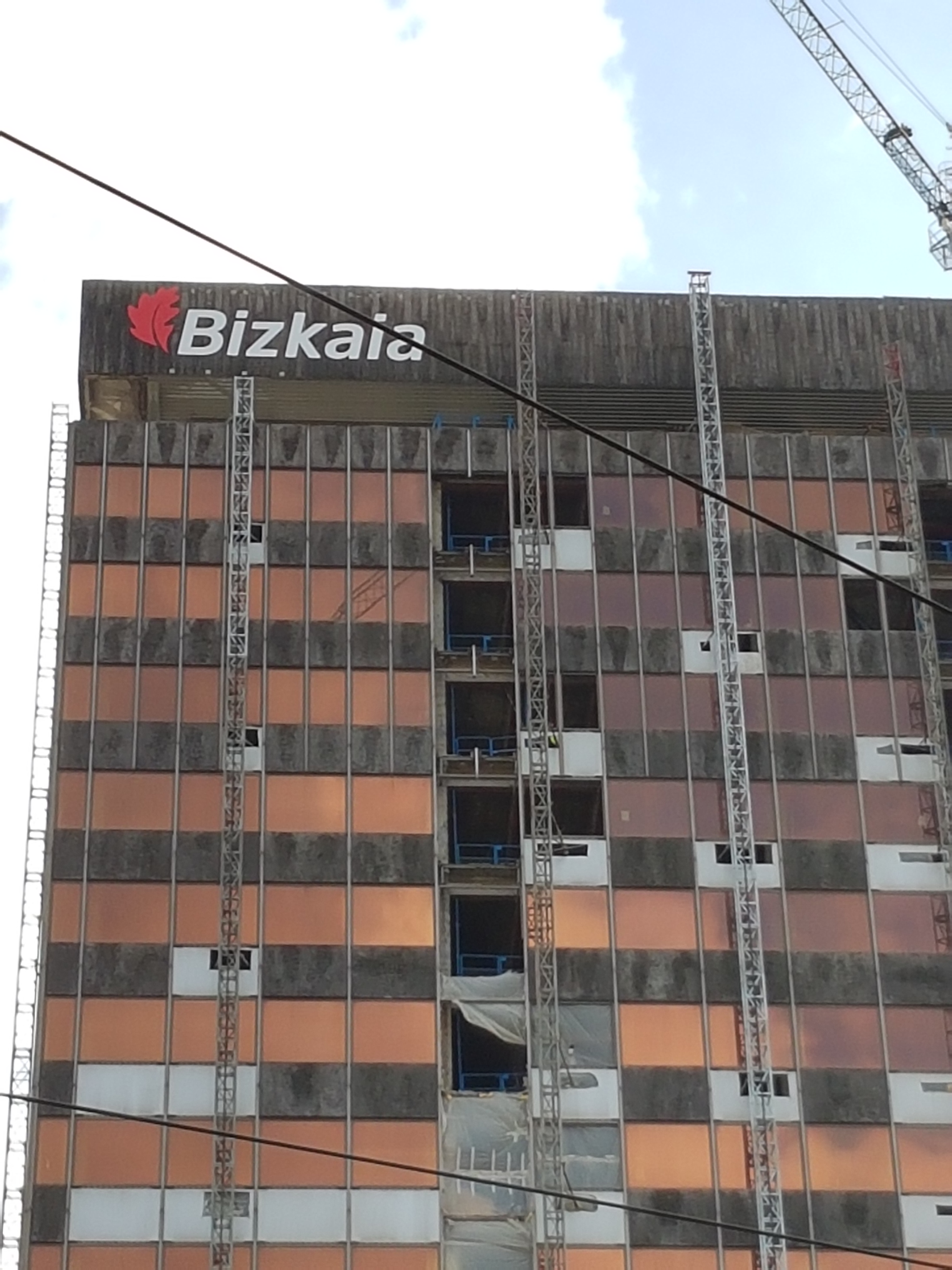 Torre Bizkaia, en obras.